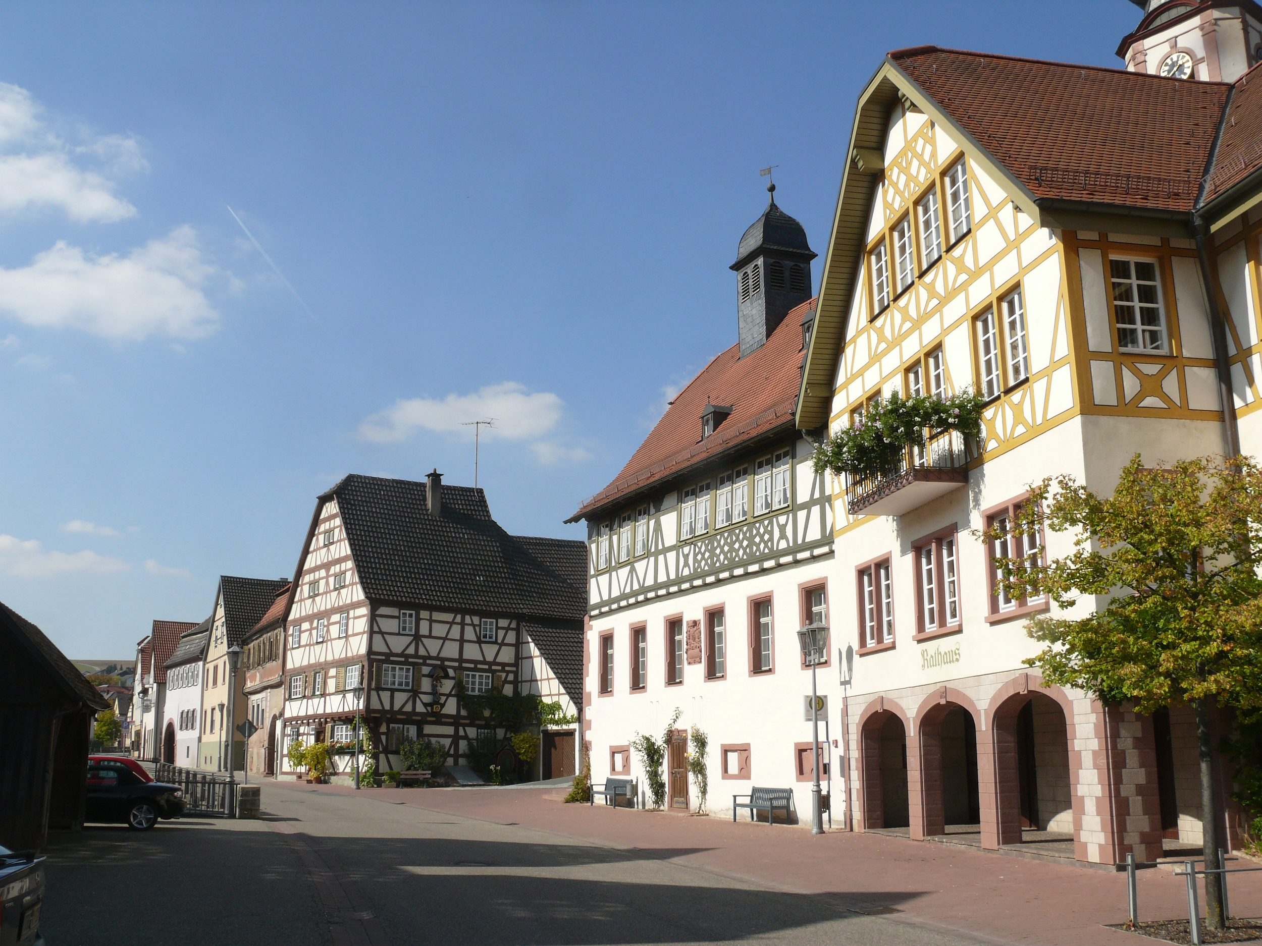 Rathaus, Fachwerkhäuser in Königheim